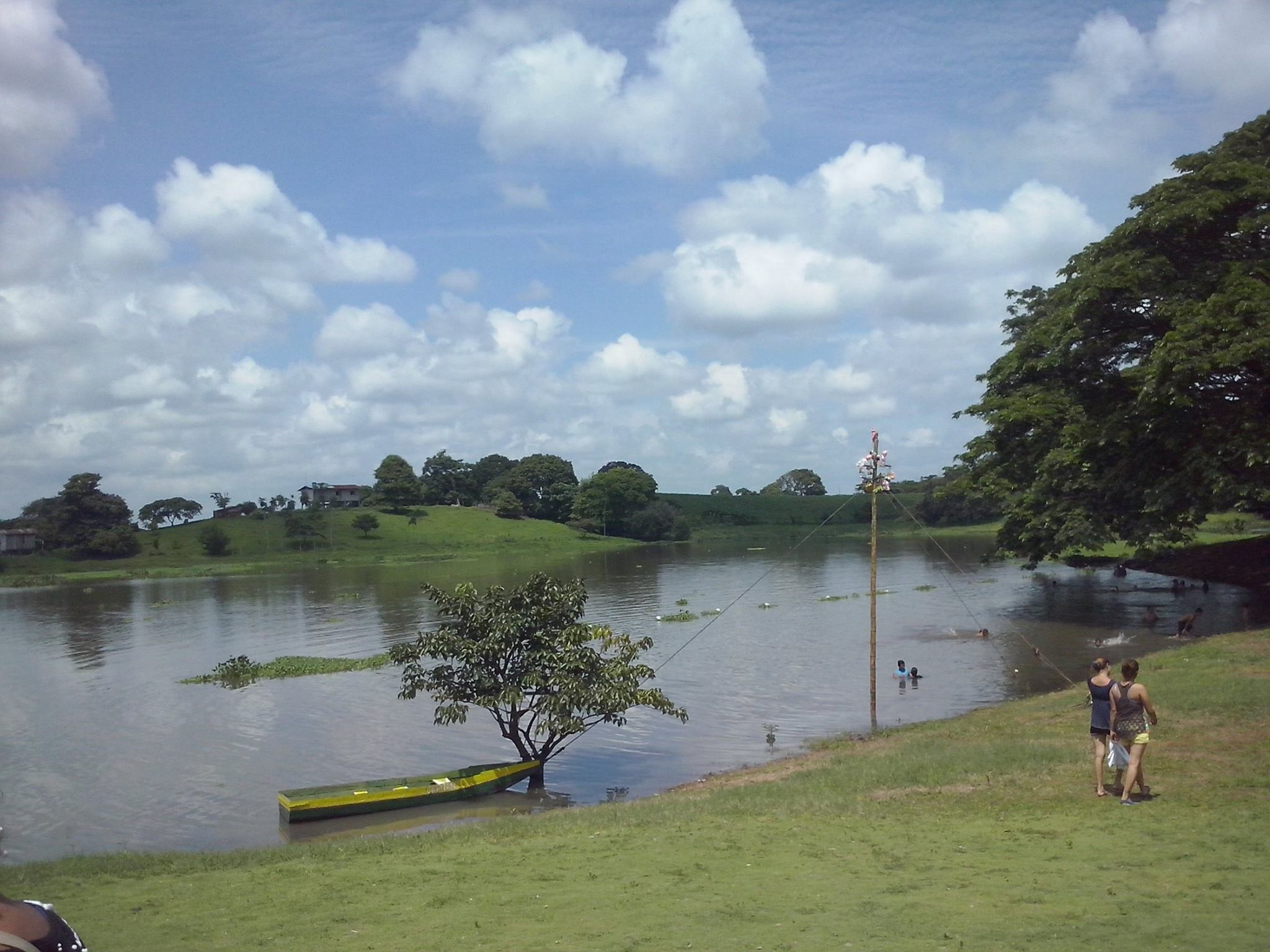 Abras de Mantequilla, Equador